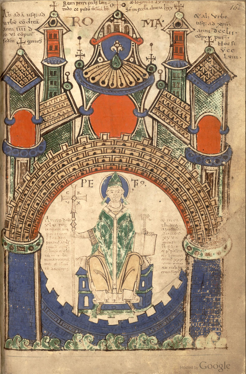 Le pape. Liber Floridus (Ghent University) 1120. (Google Books)